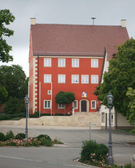 Stetten am kalten Markt Rathaus (erbaut als Schloss von Veit Georg von und zu Hausen, 1555)